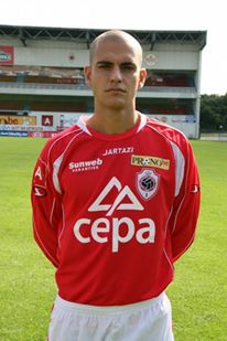 Kiko Insa en su estancia en el Royal Antwerp FC, equipo belga filial del Manchester United.